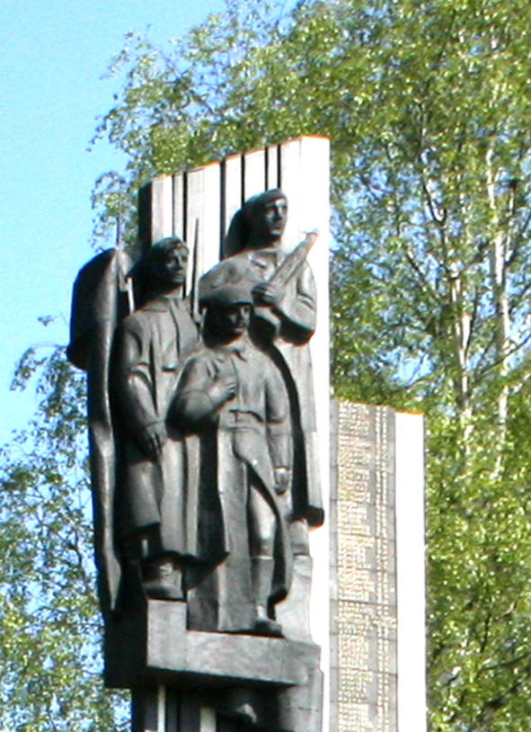 Святая троица бойцов в навершии стелы Памяти Погибших истоковцев